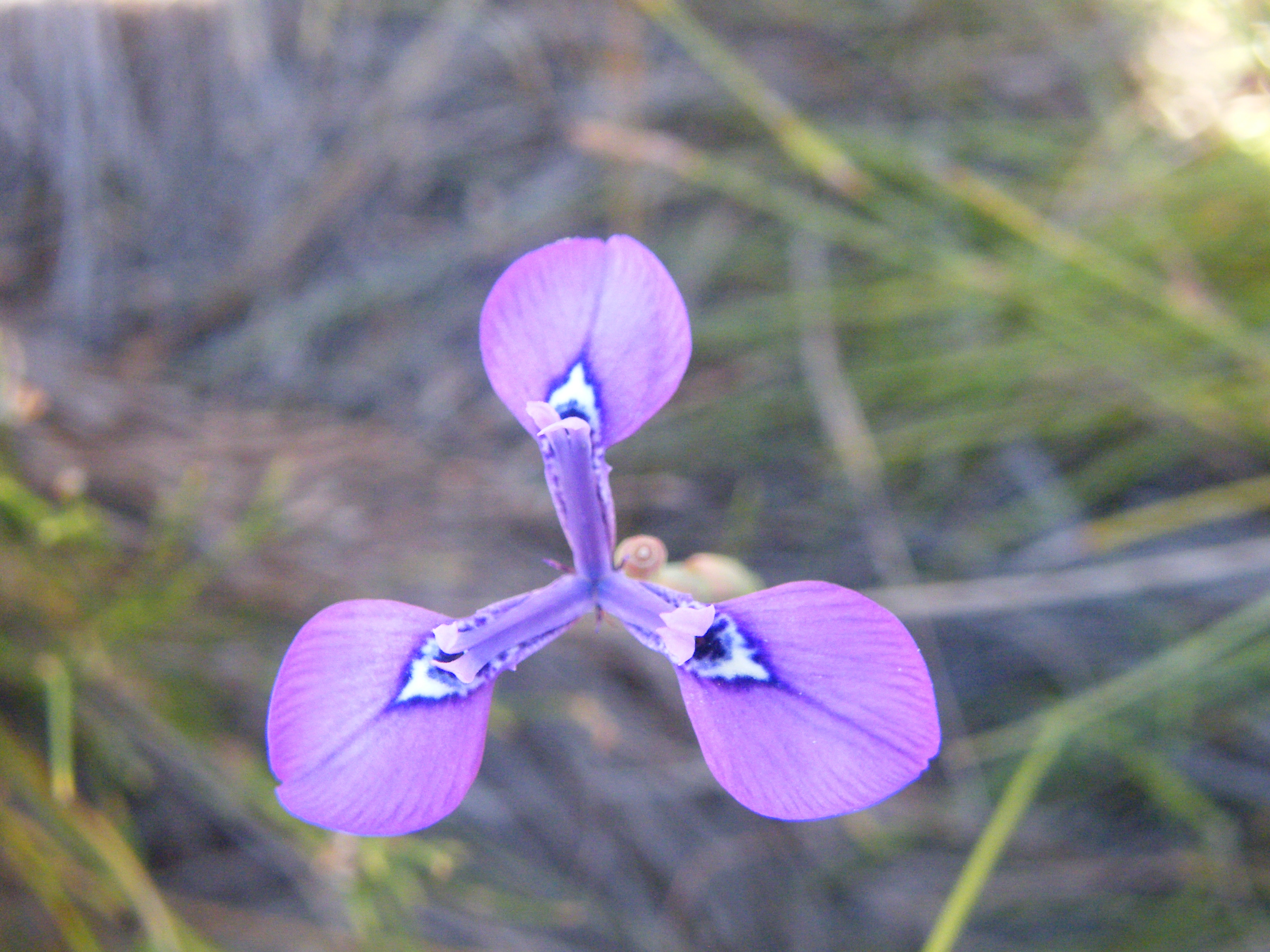 blou-uintjie